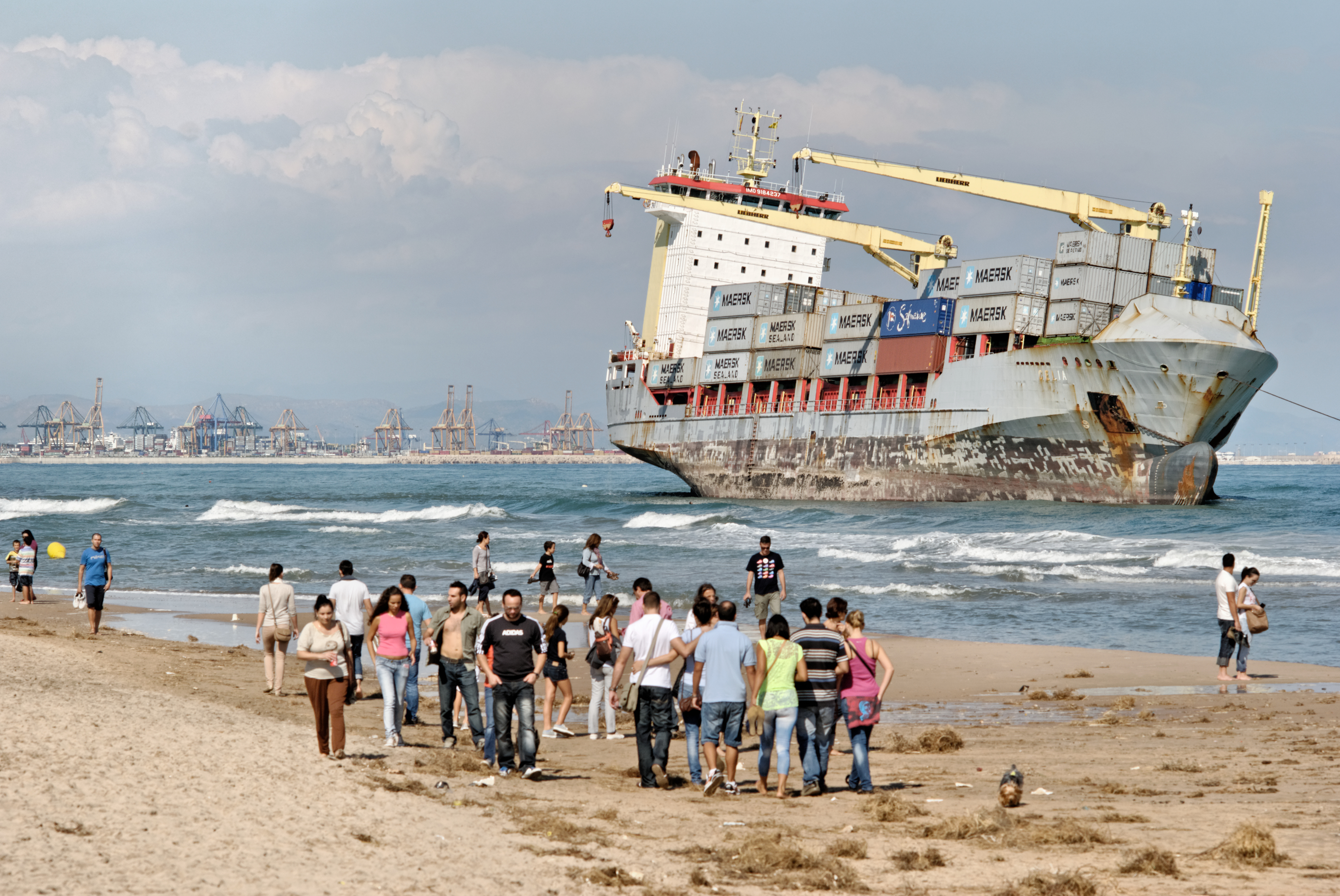 Carguero encallado en la Playa del Saler